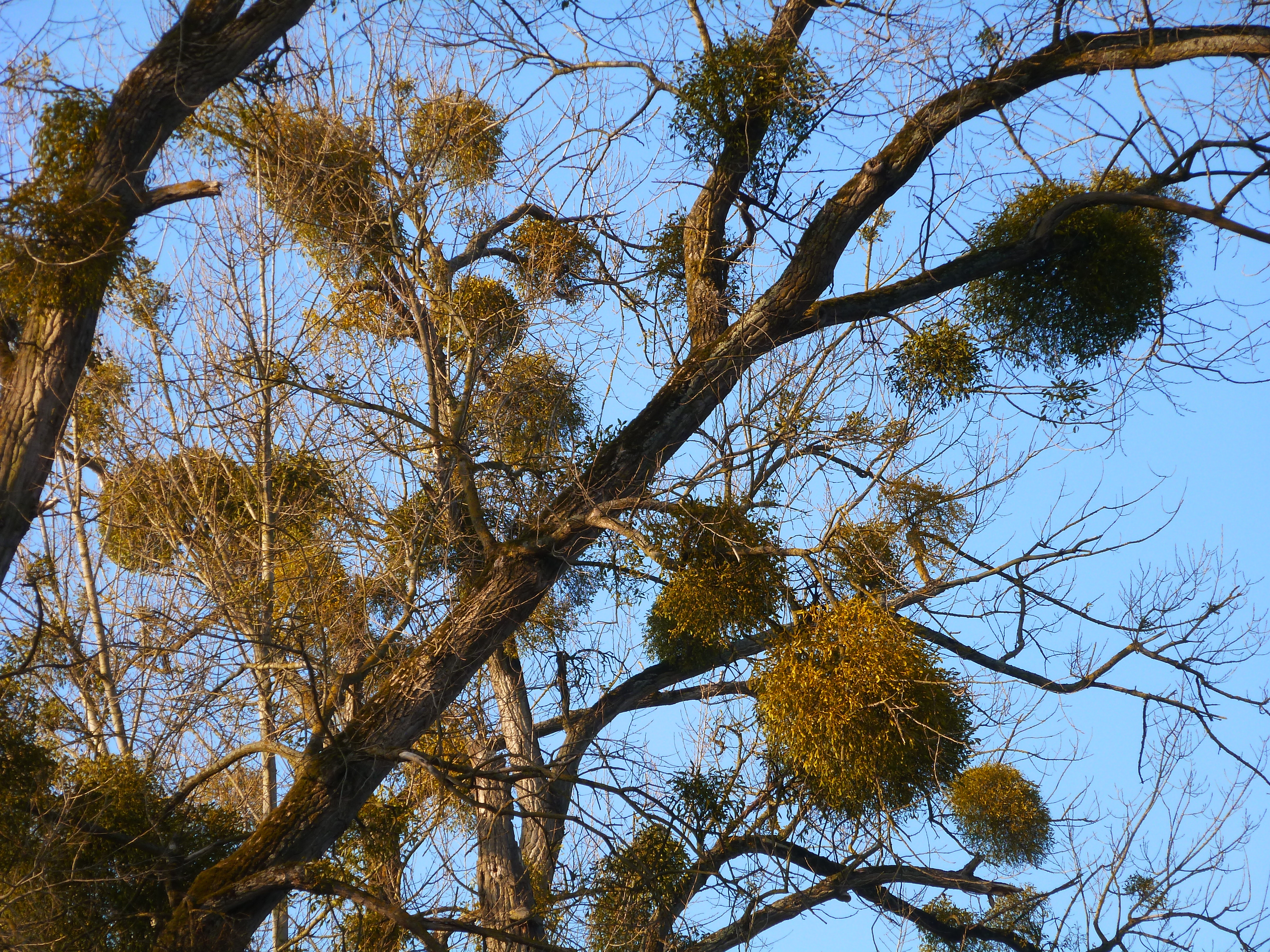 Réserve naturelle du Rohrschollen (Strasbourg).